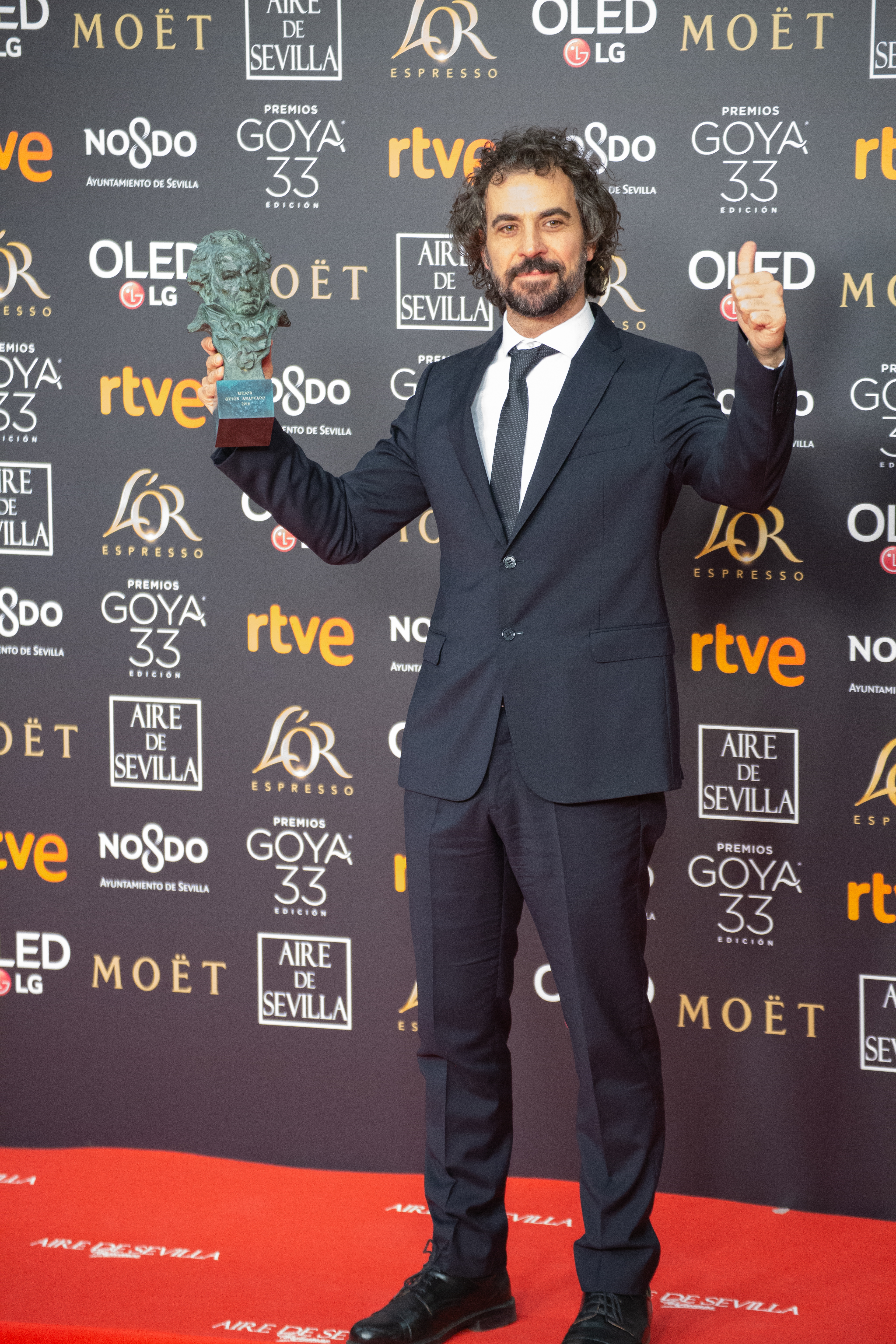 Premio Goya 2019 al Mejor Guión adaptado por "La noche de 12 años"